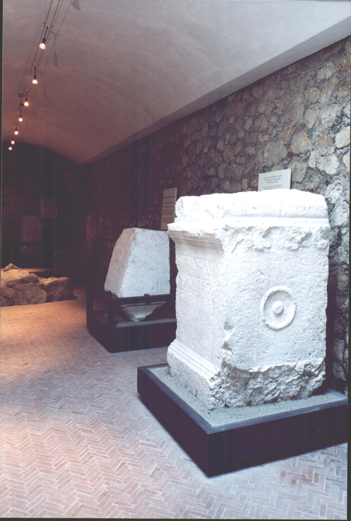 Lapidarium